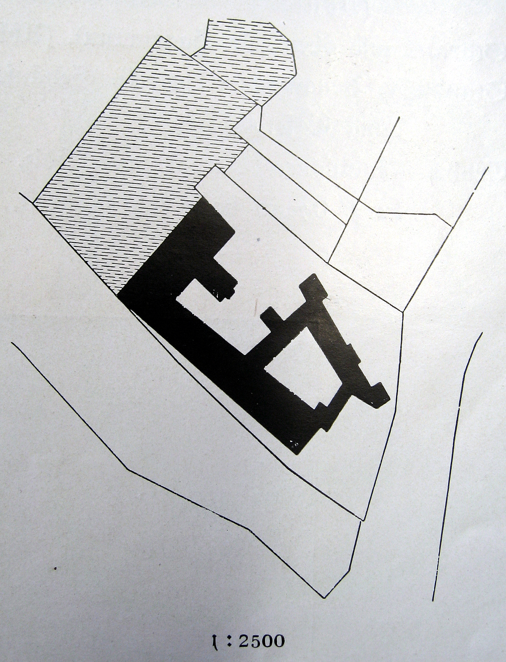 Das Haus Witten, auch Burg Berge zu Witten, ist ein Rittersitz im Süden der Stadt Witten, Ruhrstraße 86 hier: Lageplan des Hauses Witten